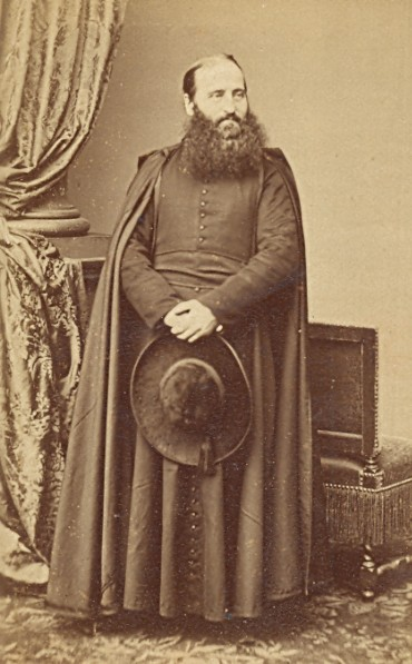 Alphonse Ratisbonne, Priester aus Frankreich, jüdischer Konvertit zum Katholizismus